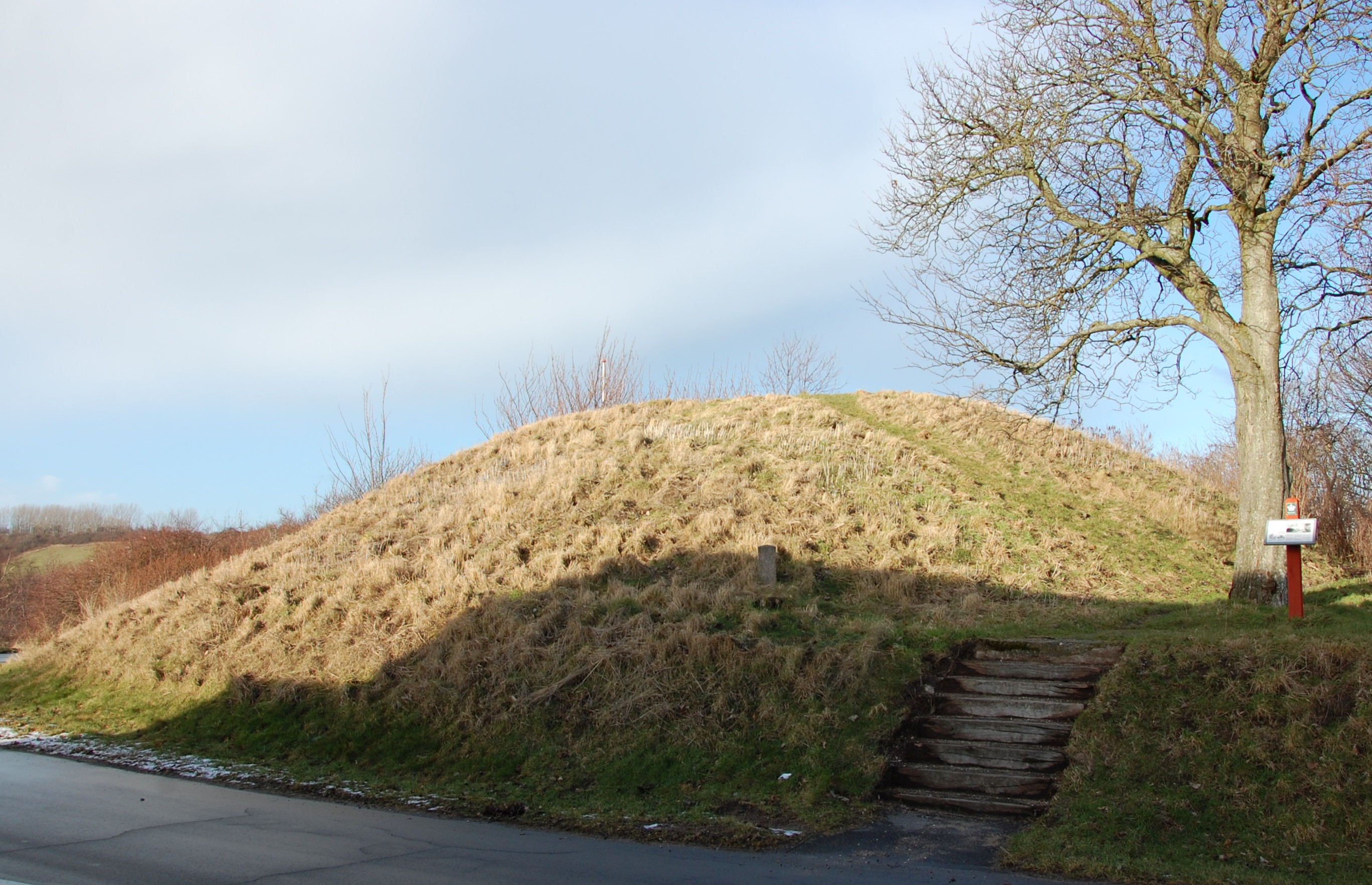 Troldstuerne, prähistorisches Grab bei Stenstrup